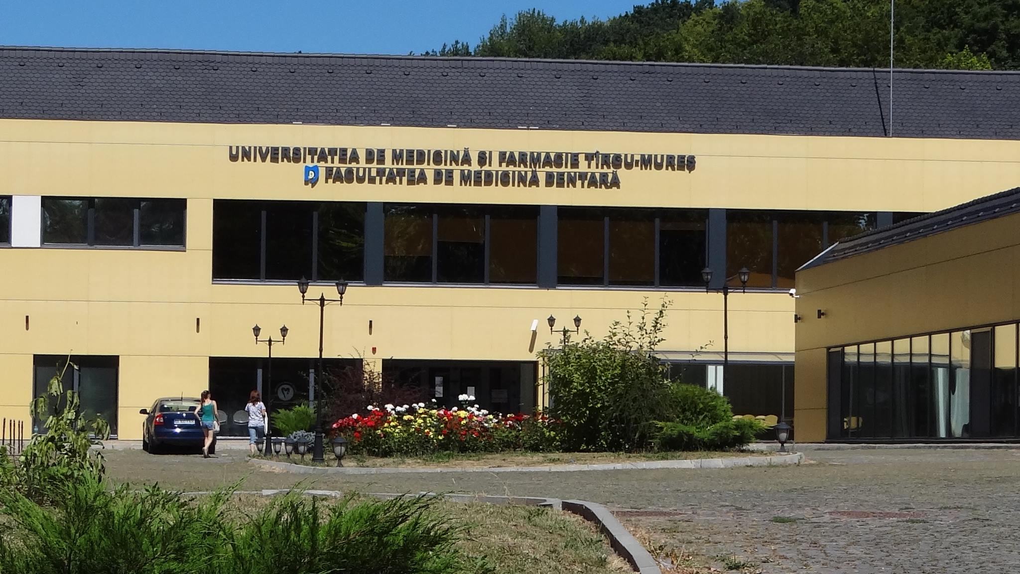 A Marosvásárhelyi Orvosi és Gyógyszerészeti Egyetem (MOGYE) Fogorvostudományi Karának épülete